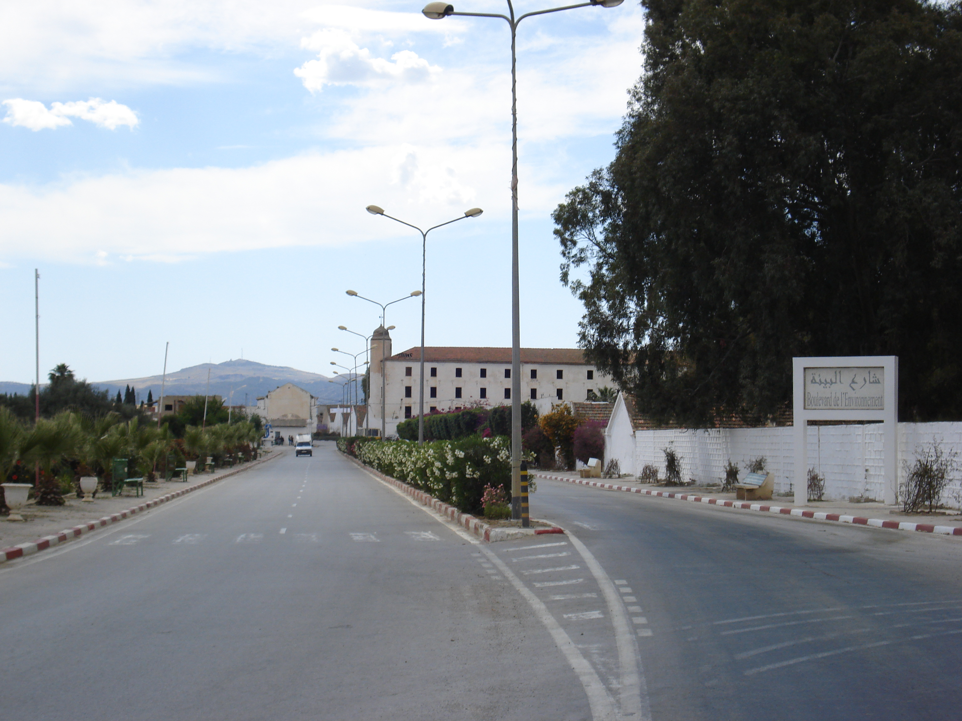 El Batan, Tunisia